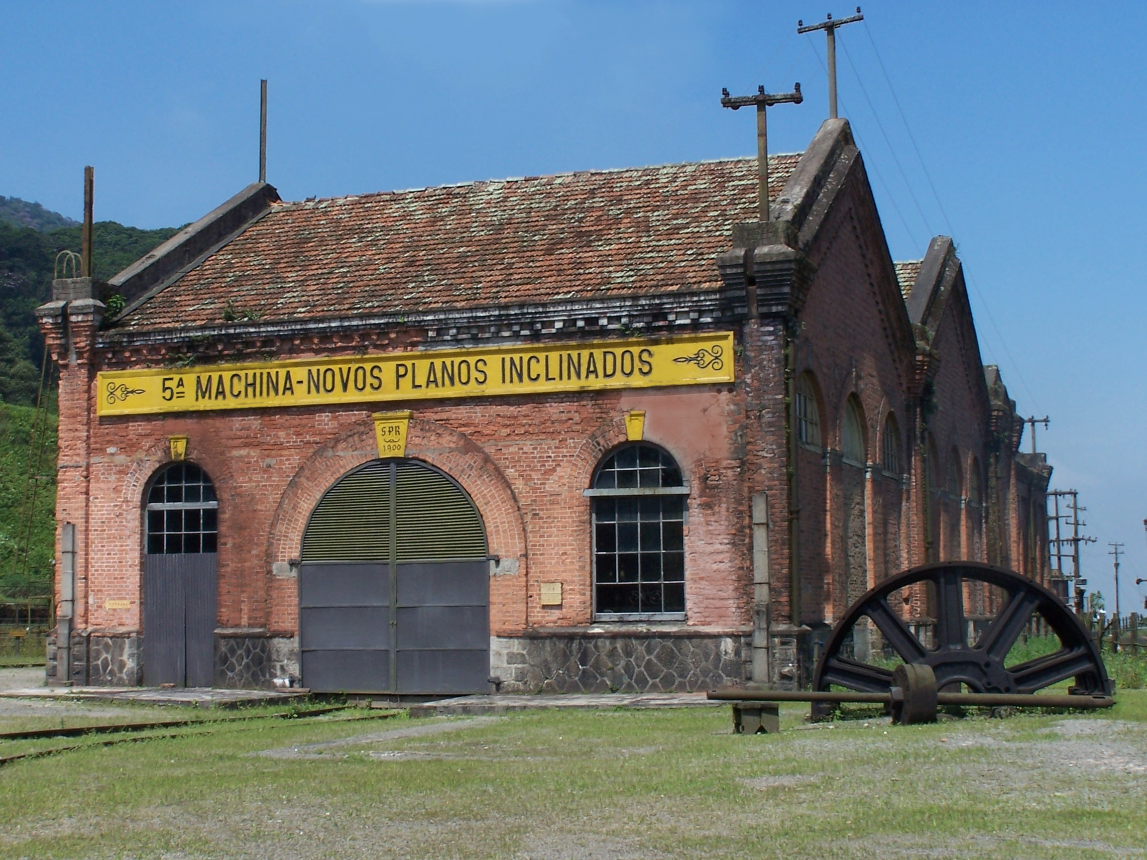 Paranapiacaba - Santo André - SP - Brasil, casa de máquina, Foto de Paulo Carmona Sanches Neto - 2005